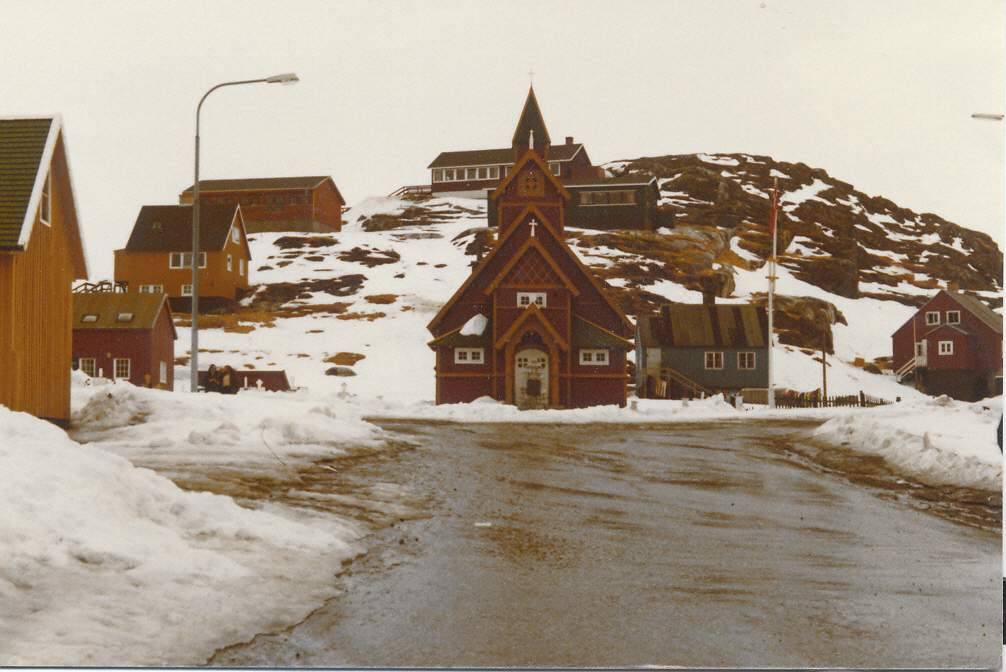 Localidad Groenlandesa The Church in Paamiut (Frederikshåb) 1980. Photo by Jan Kronsell